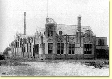 Rademakers chocoladefabriek in Den Haag